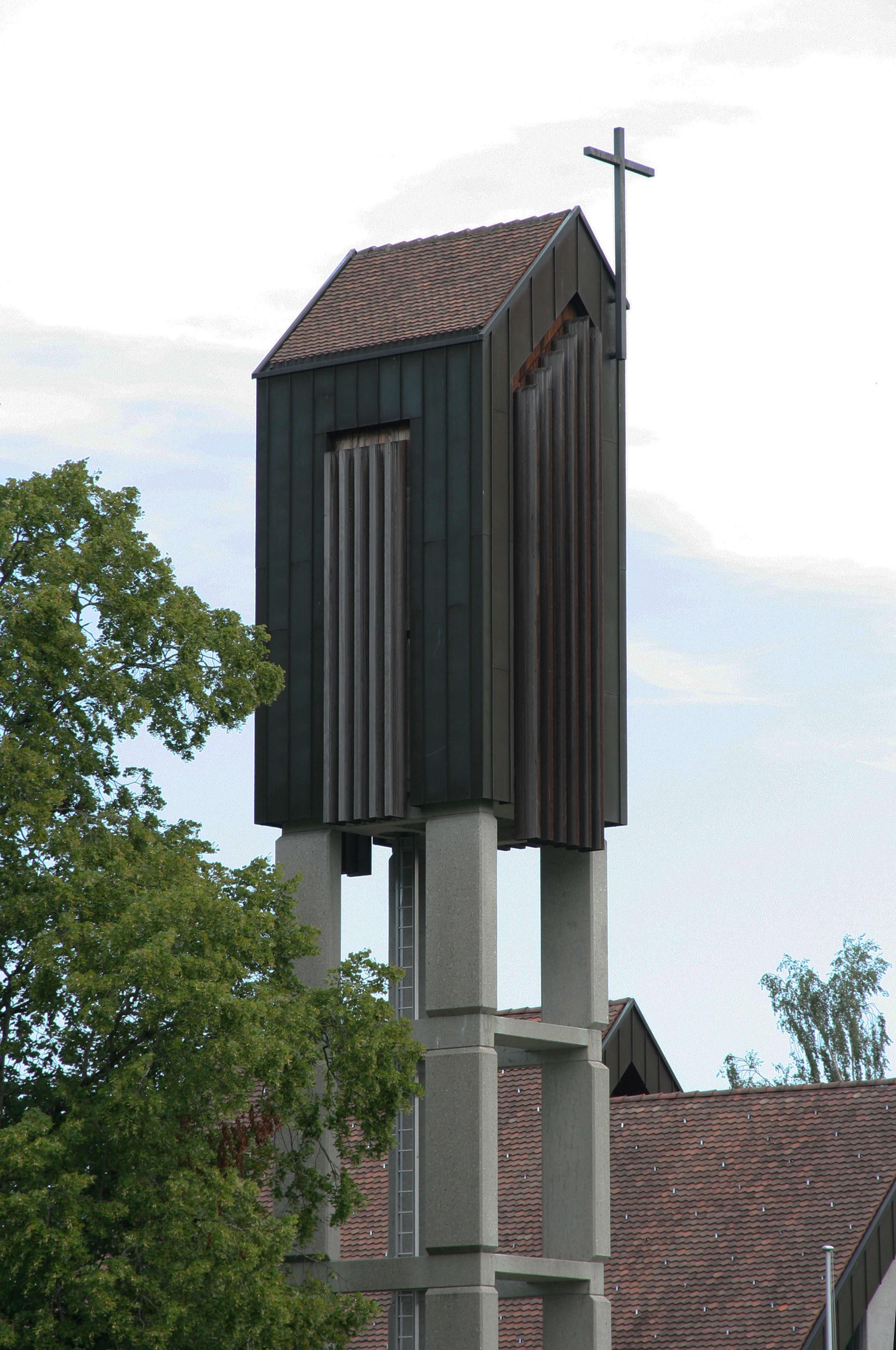 Römisch-katholische Pfarrkirche Hl. Familie Schönenberg ZH